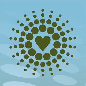 Loveparade Official logo